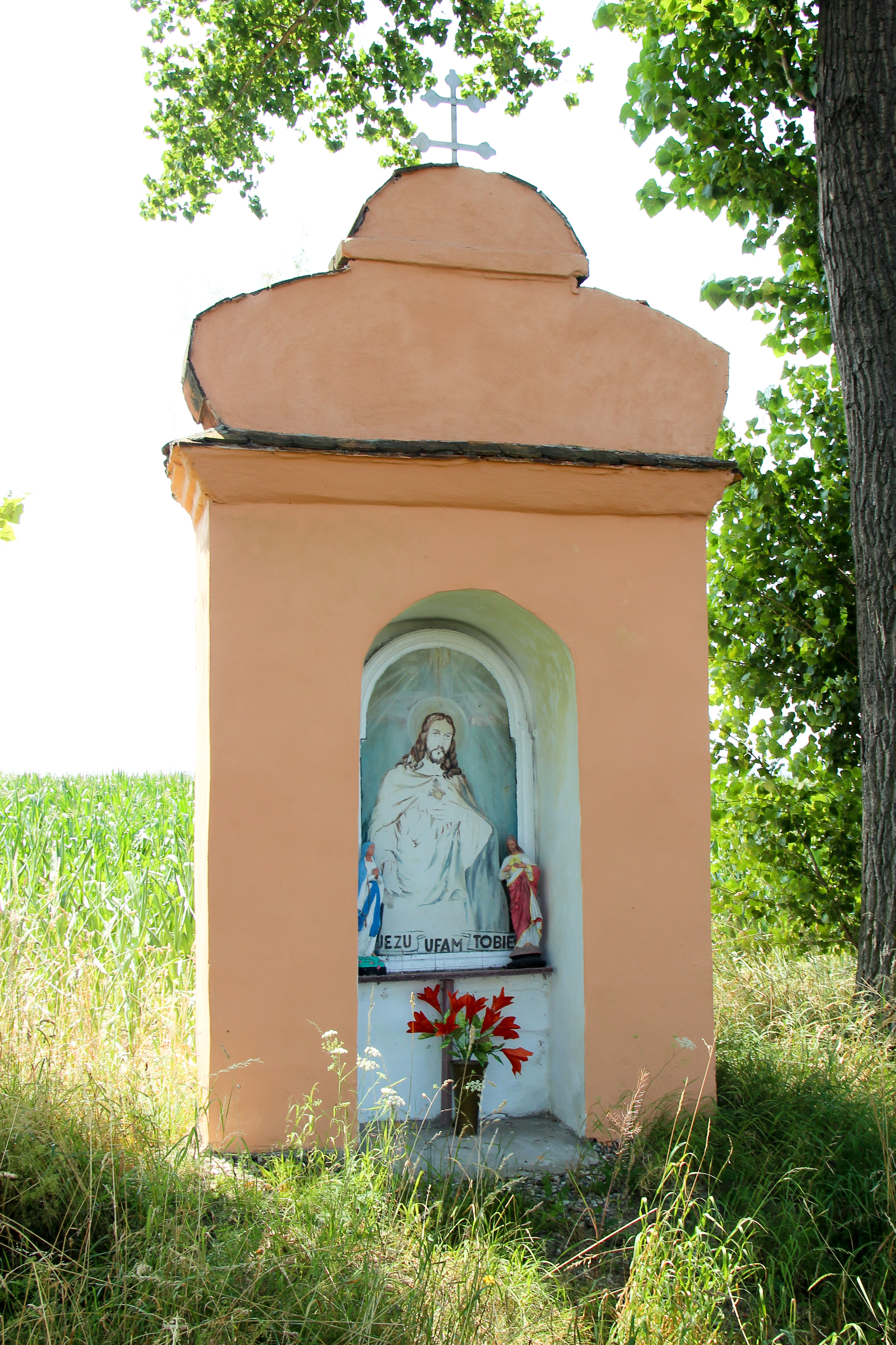 Ujeździec – wieś w Polsce, w województwie opolskim, w powiecie nyskim, w gminie Paczków.